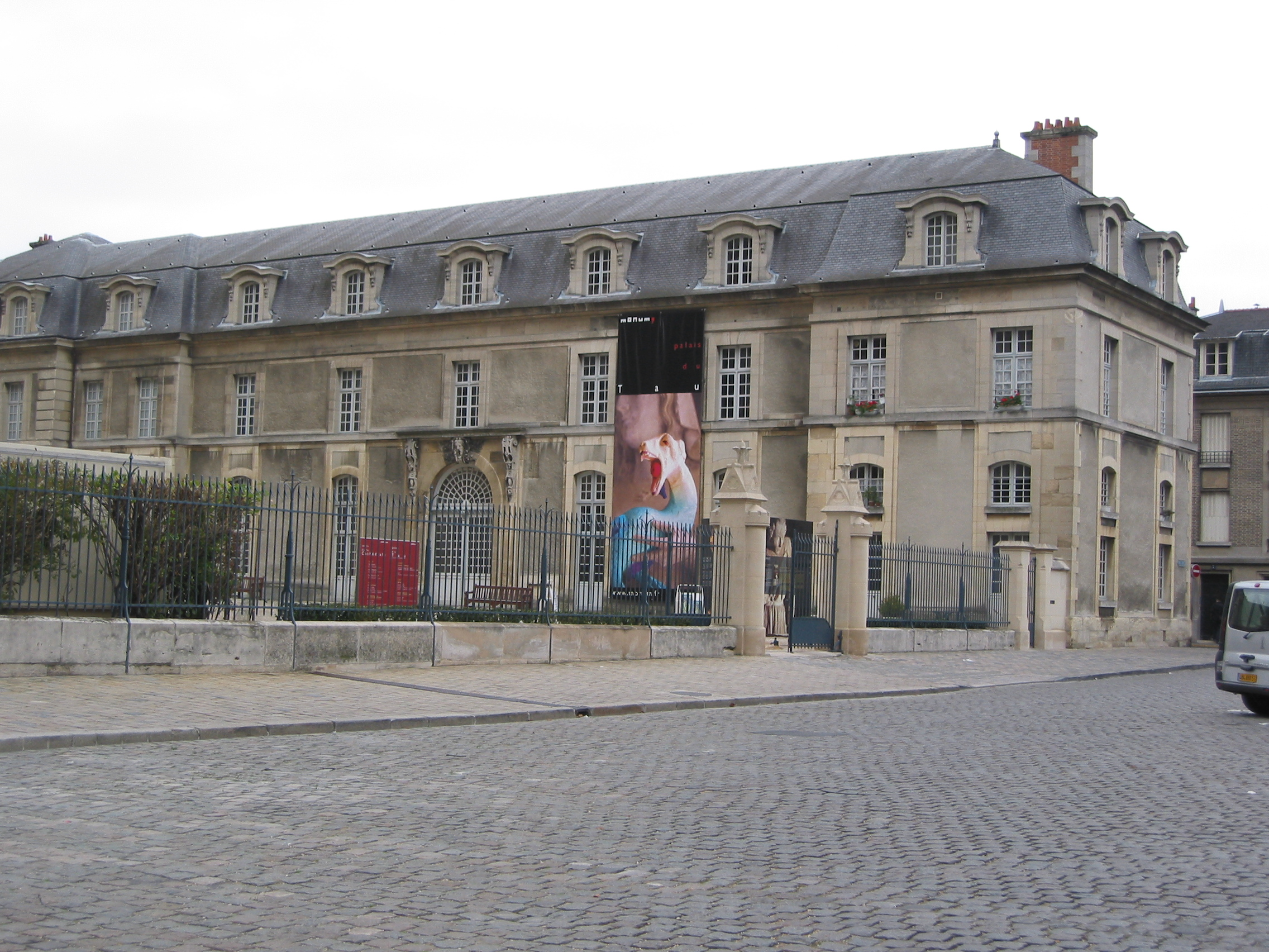 Palais du Tau, Reims, France.